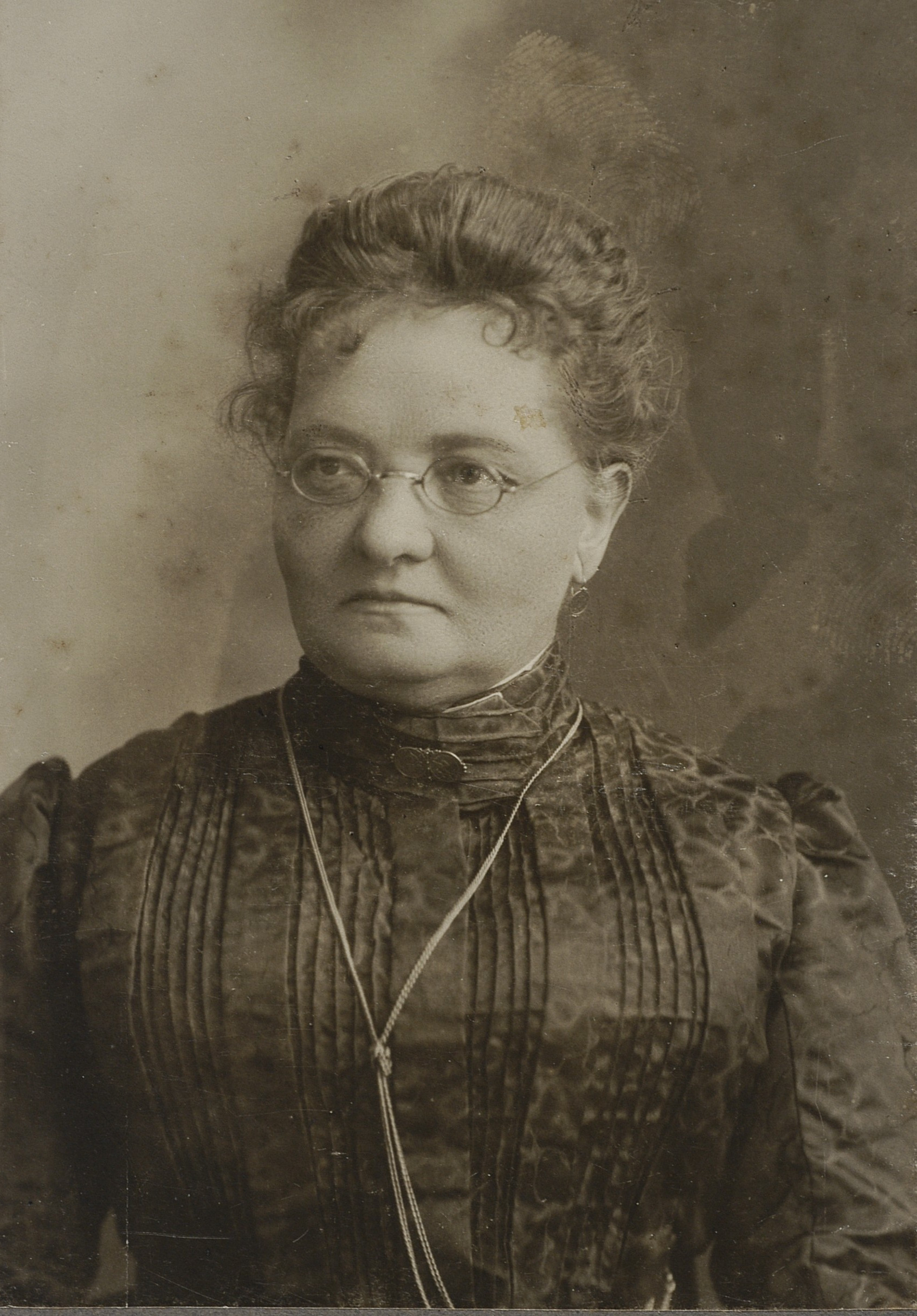 Pelagia Gdeczyk, autoportret fotograficzny